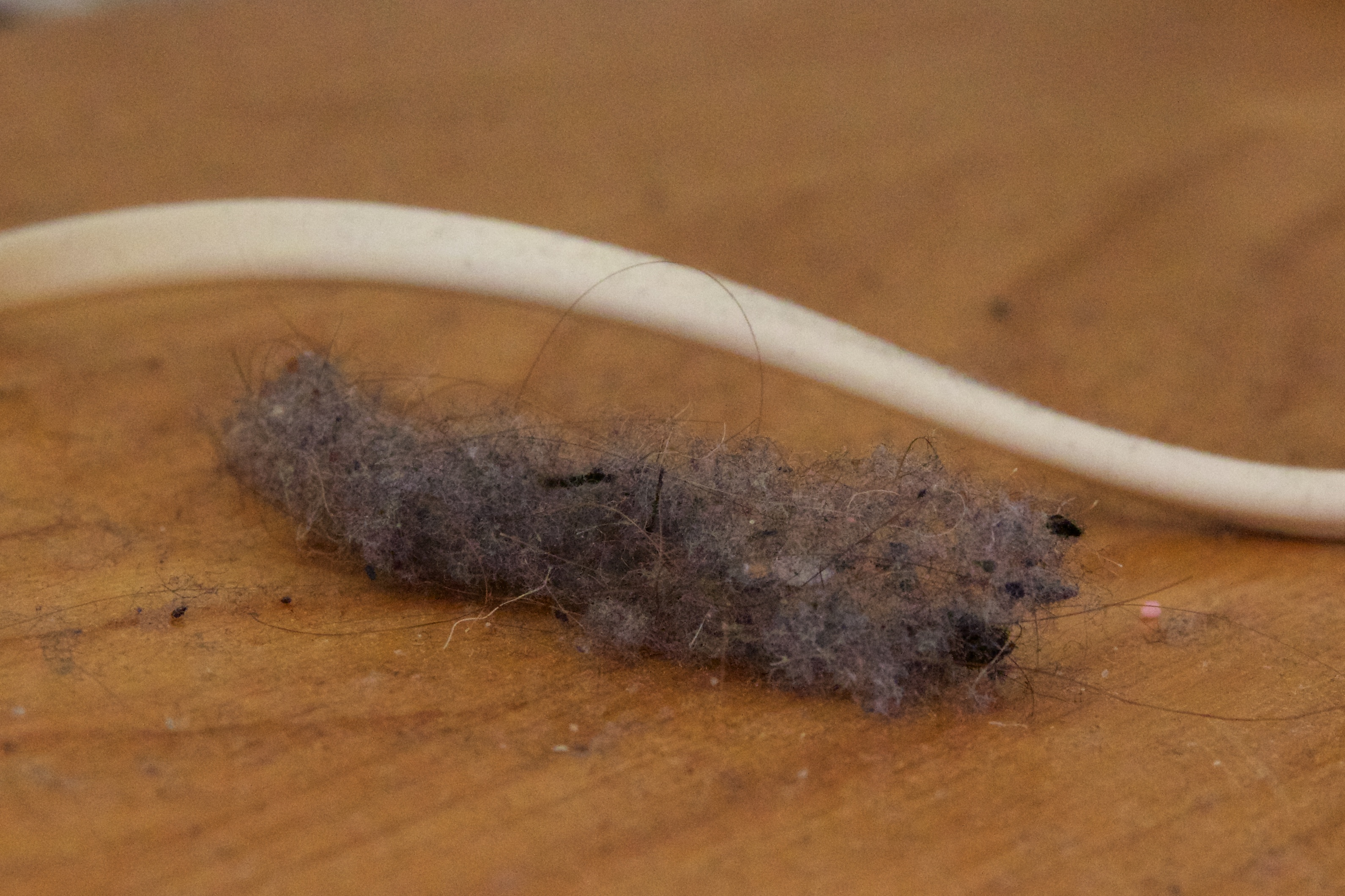 Hybelkanin